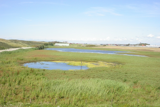 De noord bank gezien vanaf slag Beukel. De Banken is een duingebied gelegen aan de Westlandse duinenkust tussen Monster en Hoek van Holland.